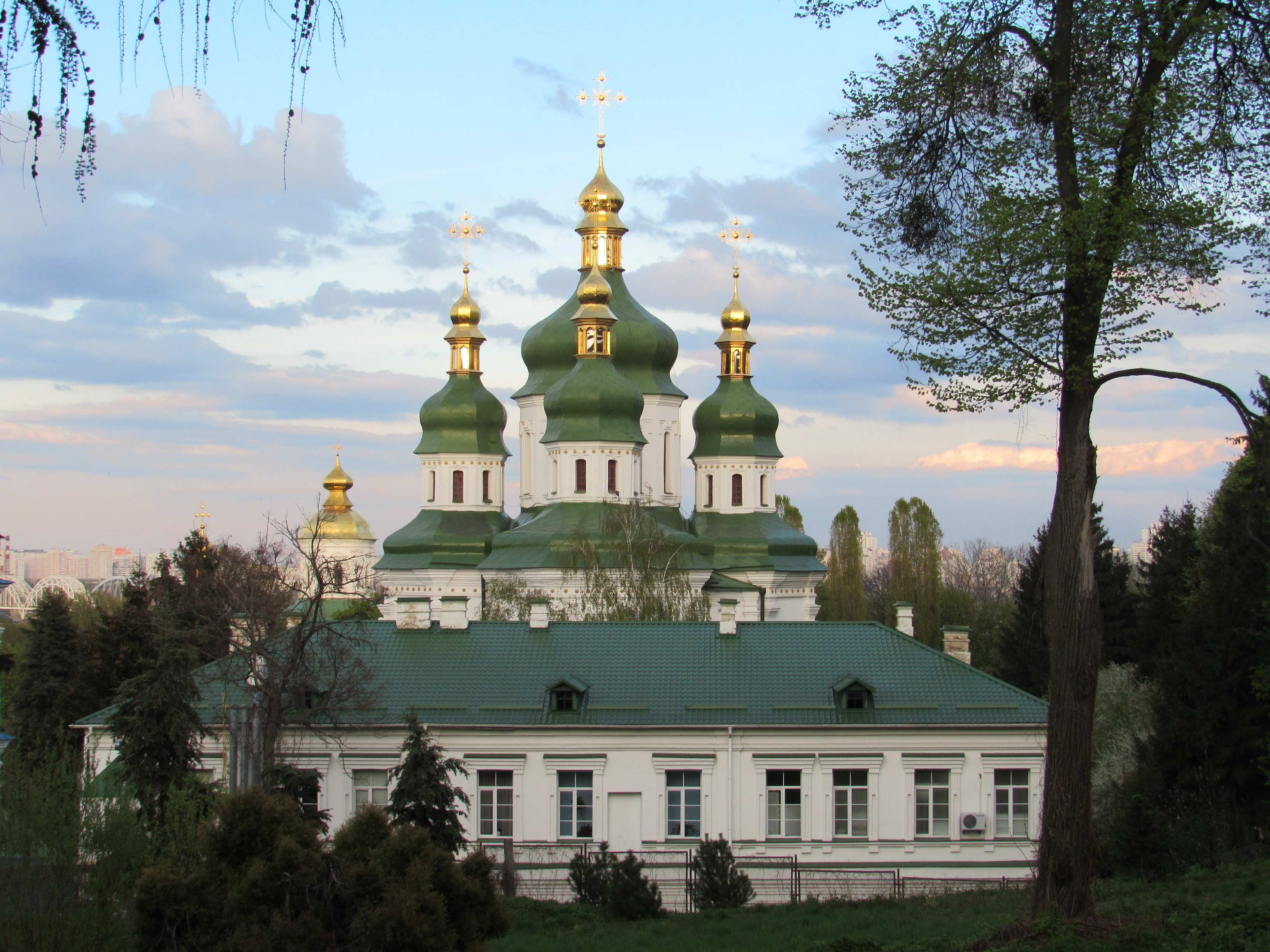 Комплекс Свято-Михайлівського Видубицького монастиря, Київ, Видубицька вул., 40